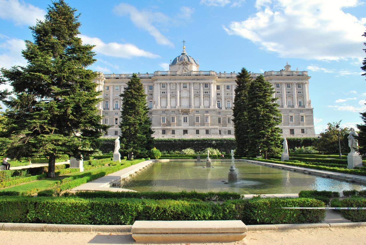 Palacio Real y Jardines de Sabatini